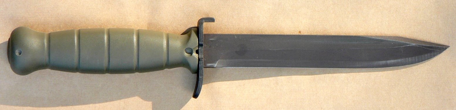 Glock Feldmesser FM 78